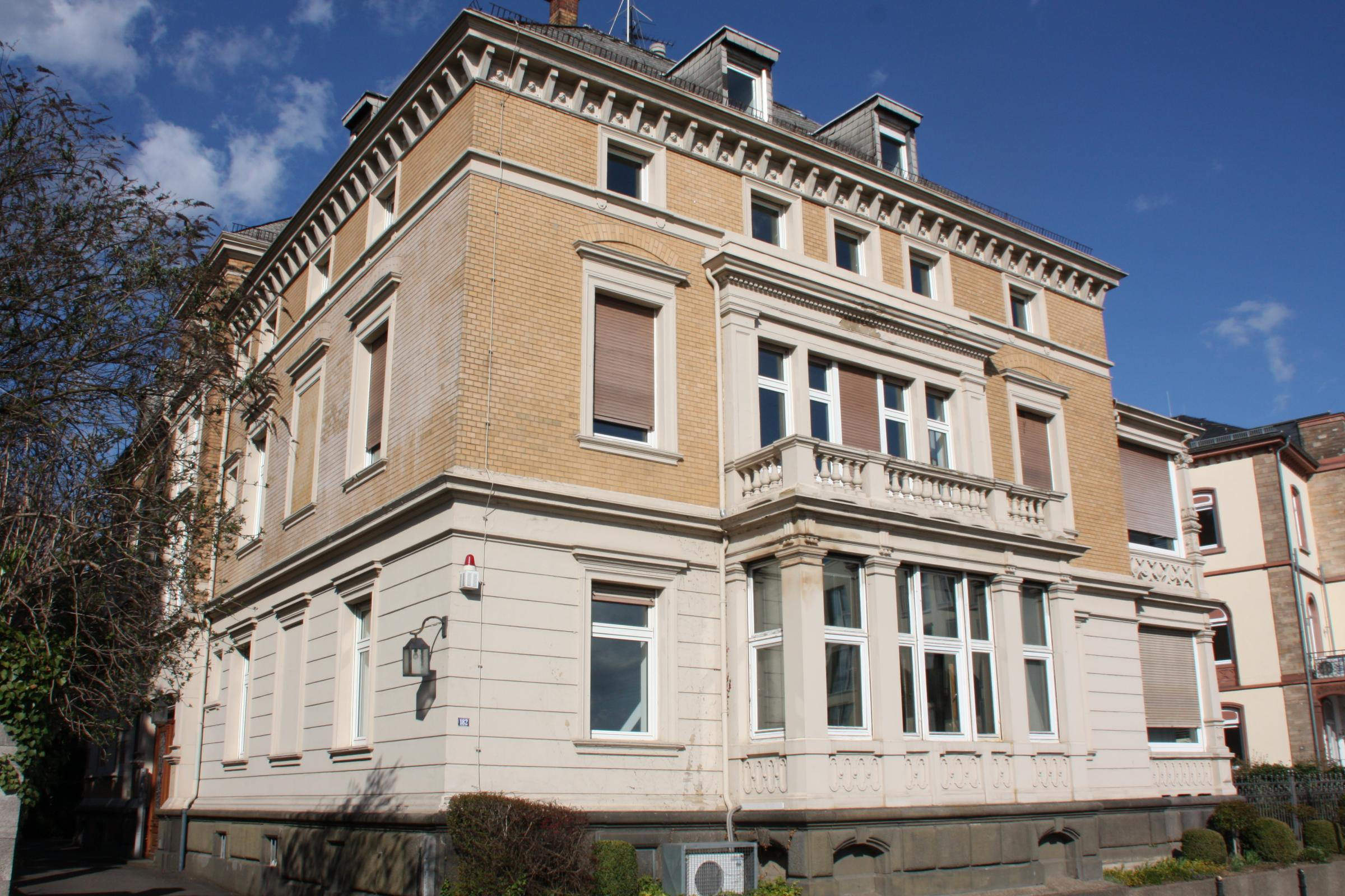 Villa Albert am Rheinufer bei Biebrich, Wiesbaden. Bis 1901 wohnte hier Kommerzienrat Heinrich Albert (Gründer der Chemischen Werke Albert)